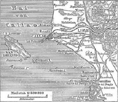 Situationsplan von Lima